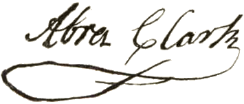 Abraham Clark's signature